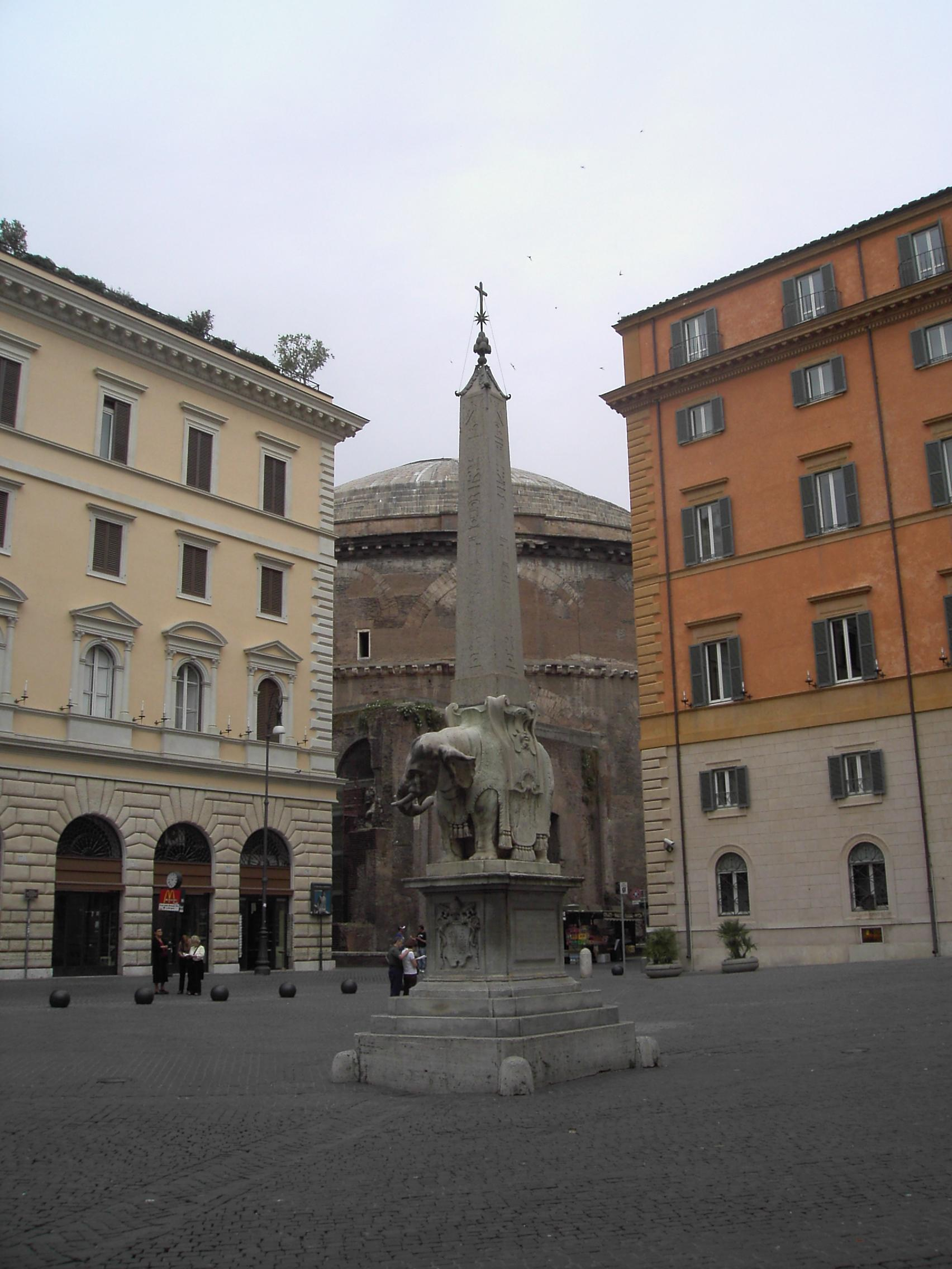 Roma, piazza della Minervaverso il Pantheon